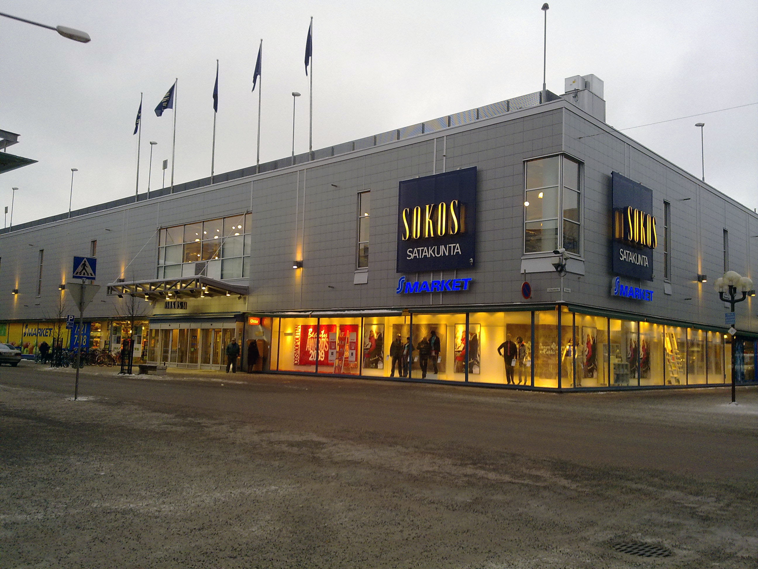 Porin Sokos.